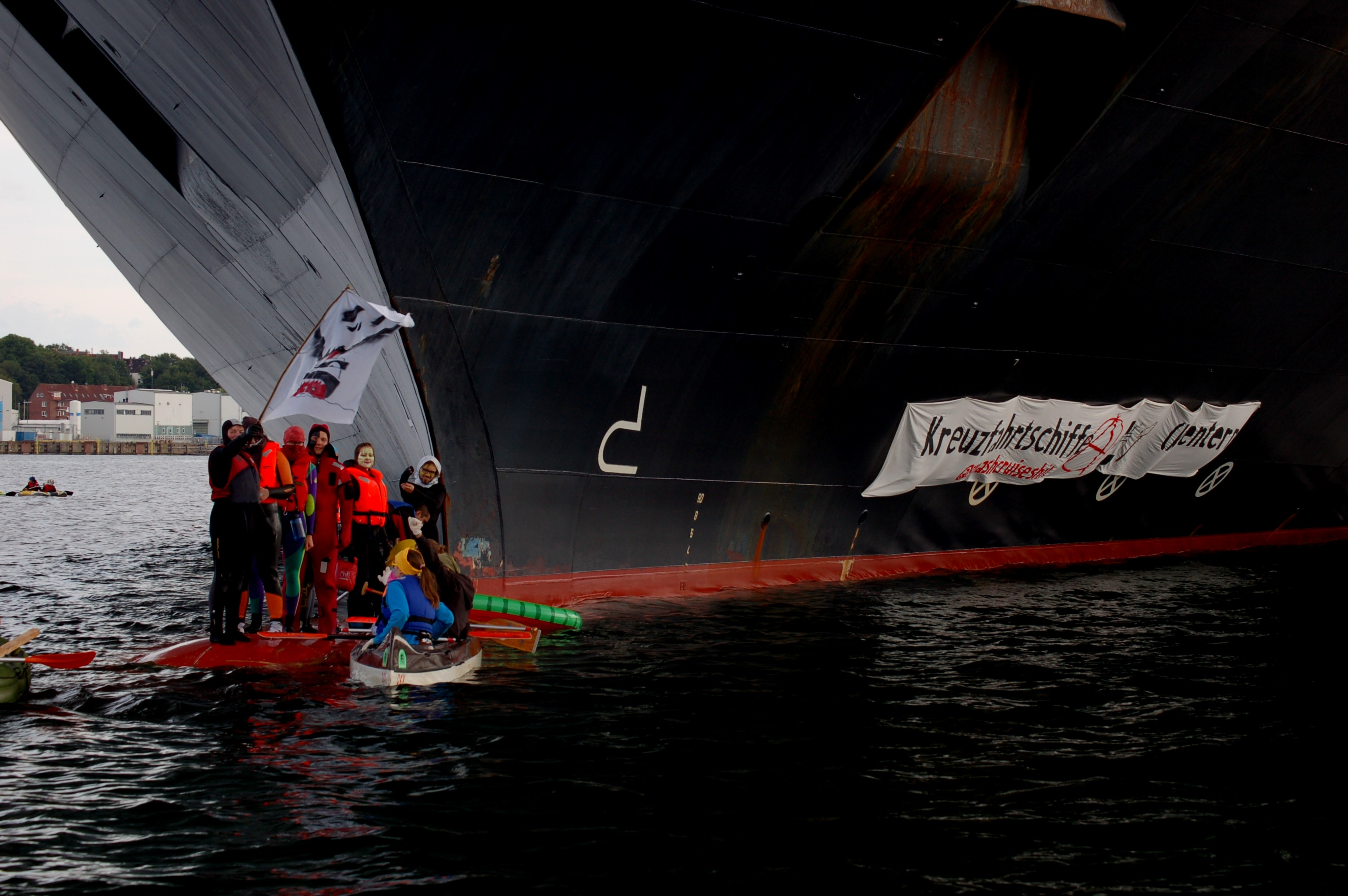 Blockade des Kreuzfahrtschiffes Zuiderdam als Protest gegen die steigenden klimaschädlichen Emissionen der Kreuzfahrtbranche, die häufig schlechten Arbeitsbedingungen an Bord und negativen ökologischen, sozialen und ökonomischen Auswirkungen auf die Zielorte des Kreuzfahrttourismus. Eine Gruppe von AktivistInnen kreuzt mit kleinen Booten vor dem Bug der Zuiderdam und ist auf den Wulstbug geklettert und verhindert so das Ablegen des Schiffes aus dem Kieler Hafen. An der Schiffswand ist ein Banner mit der Aufschrift "Kreuzfahrtschiffe (k)entern - Smash Cruise Shit" befestigt. (Kiel, Juni 2019)